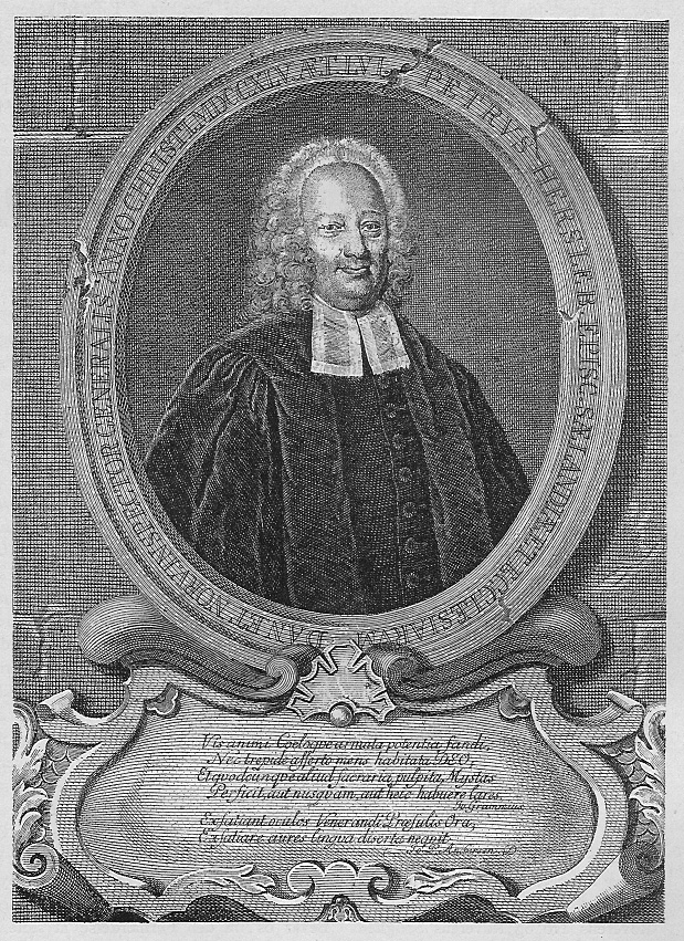 Peder Hersleb